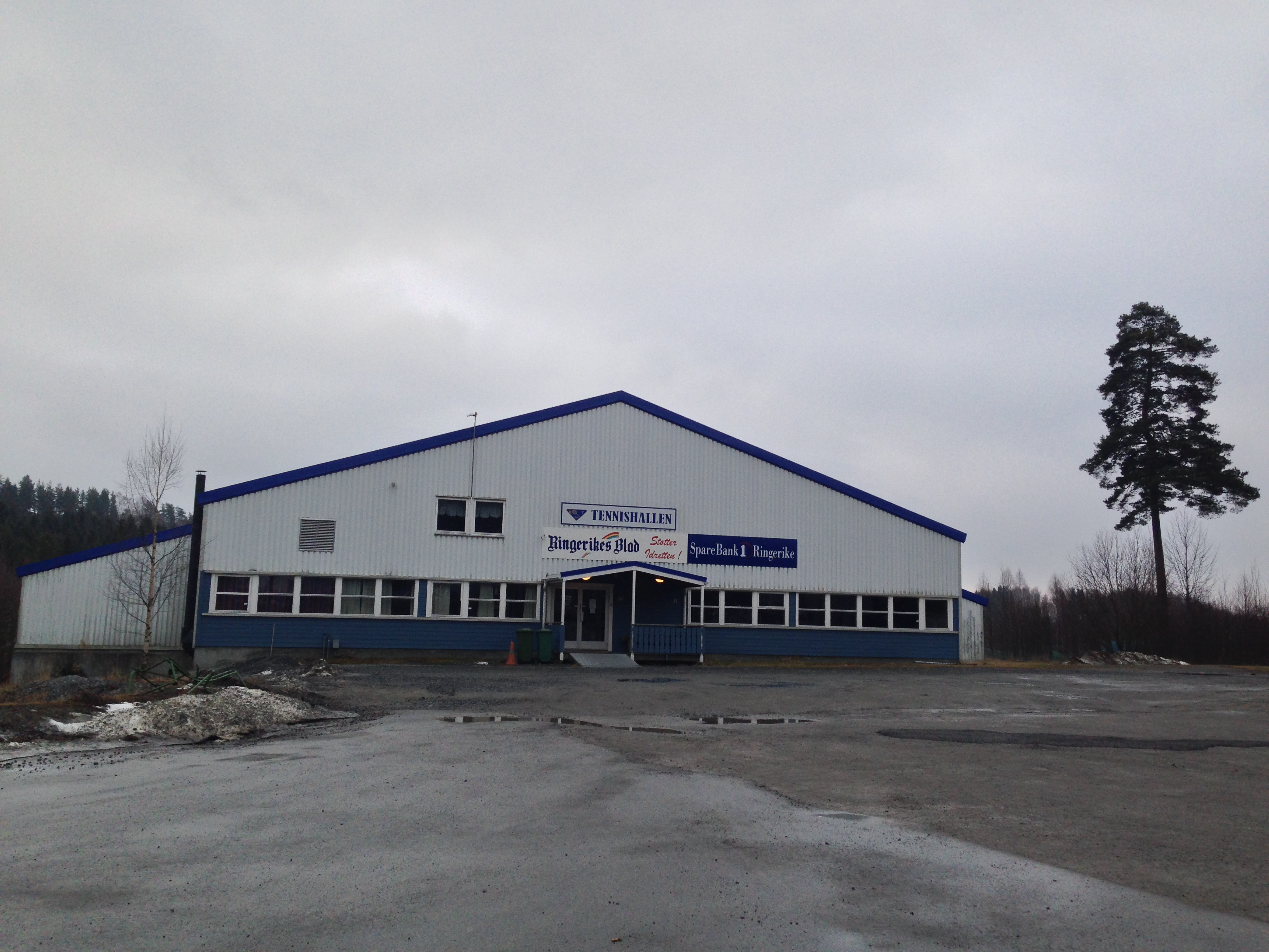 Tennishallen ved siden av Ringerikshallen i Hønefoss, Buskerud.